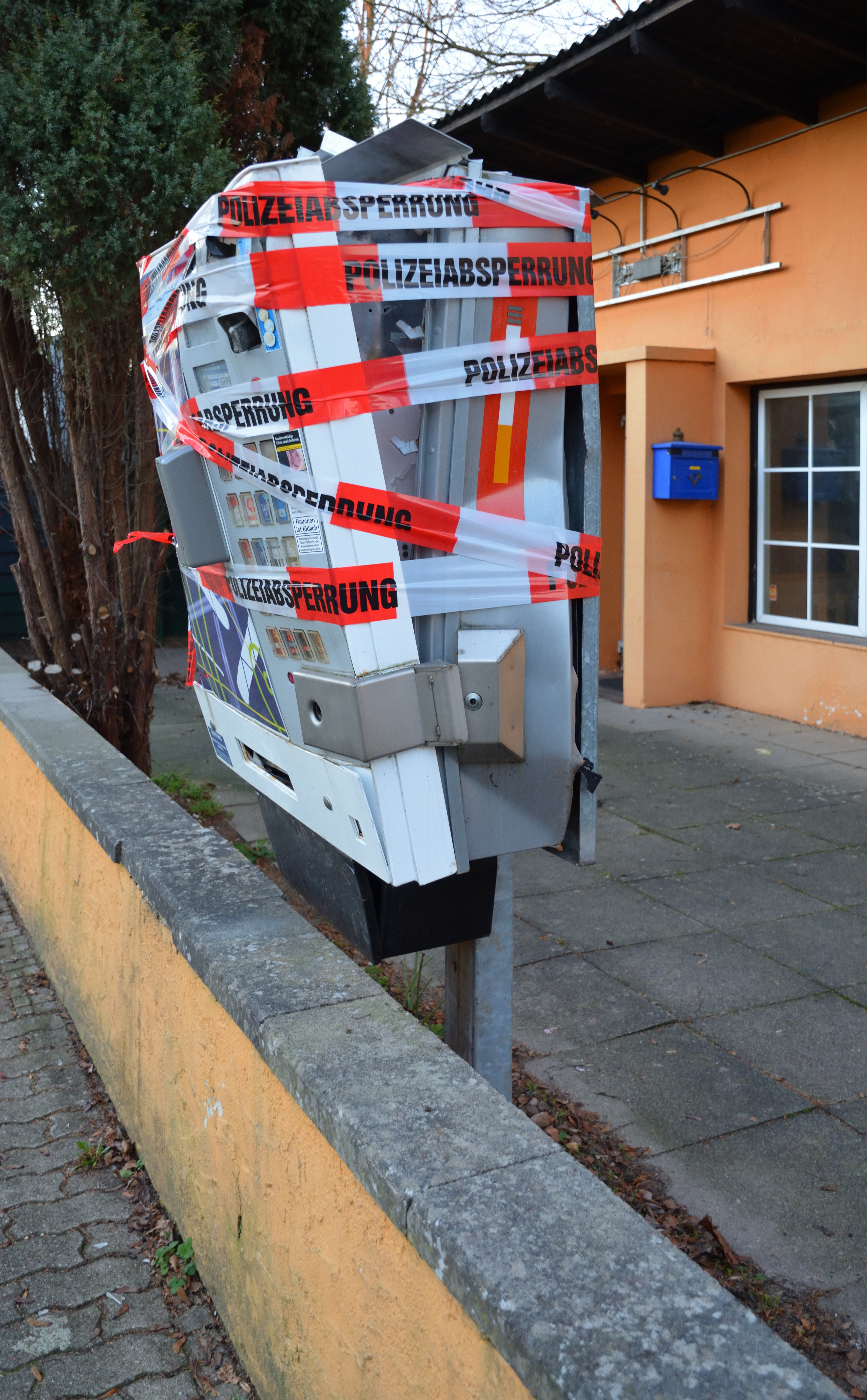 Ein gesprengter Zigarettenautomat in der Gasstrasse in Itzehoe.